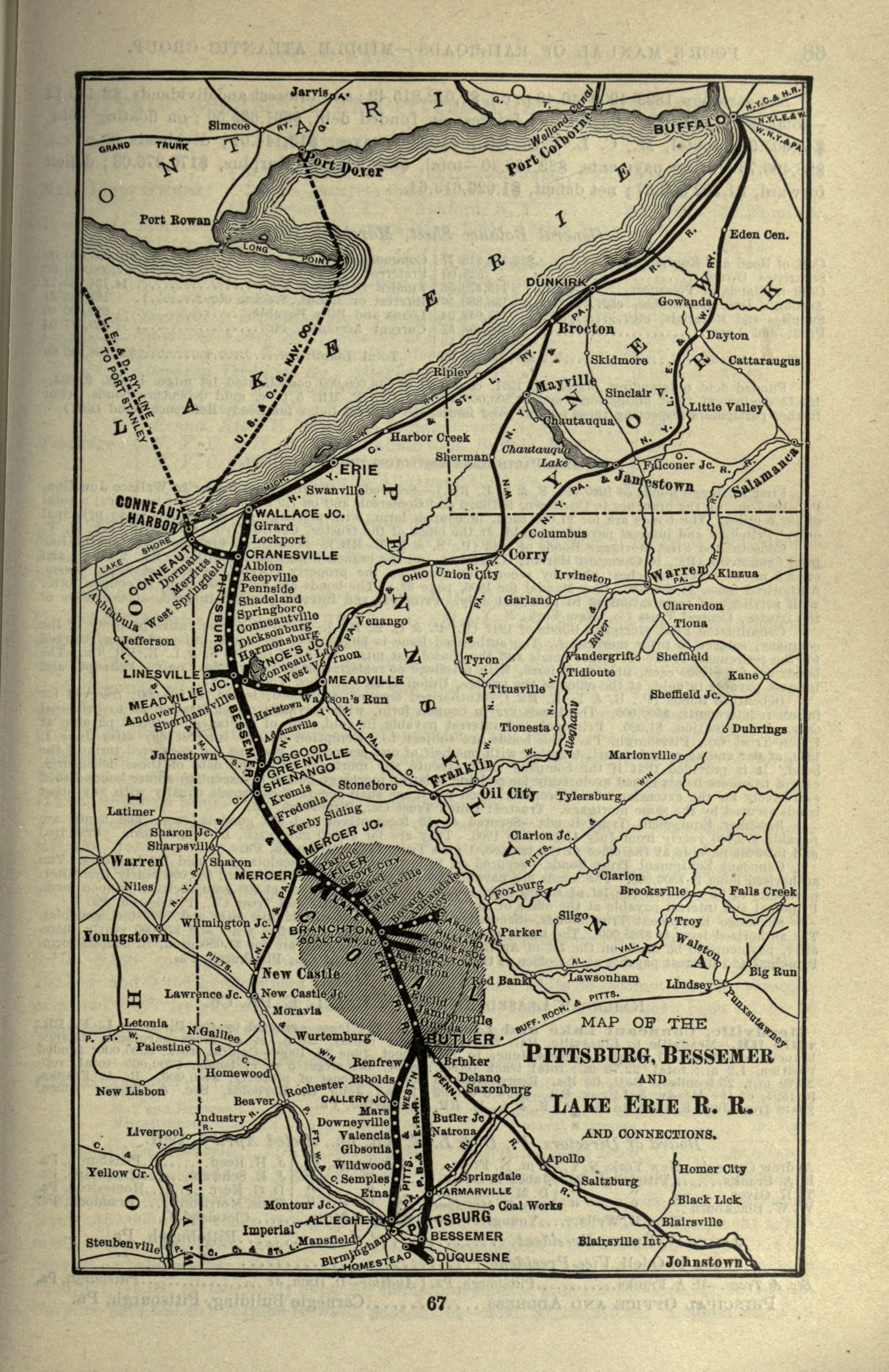 Bessemer and Lake Erie Railroad